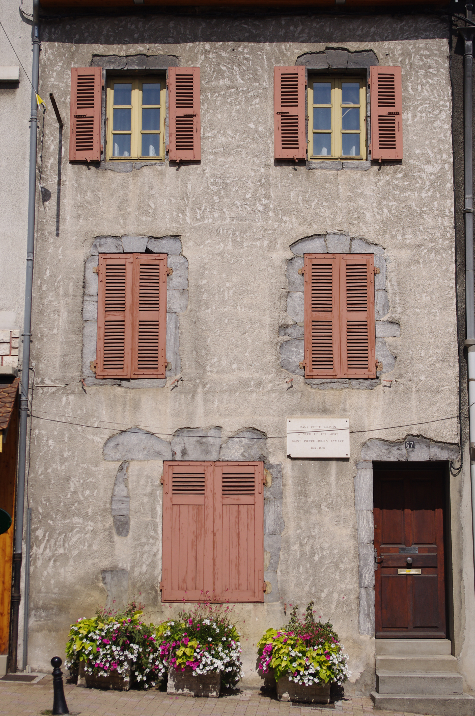 Mains natale de Saint Pierre-Julien Eymard, fondateur de la Congrégation du Saint-Sacrement, né à la Mure le 4 février 1811.